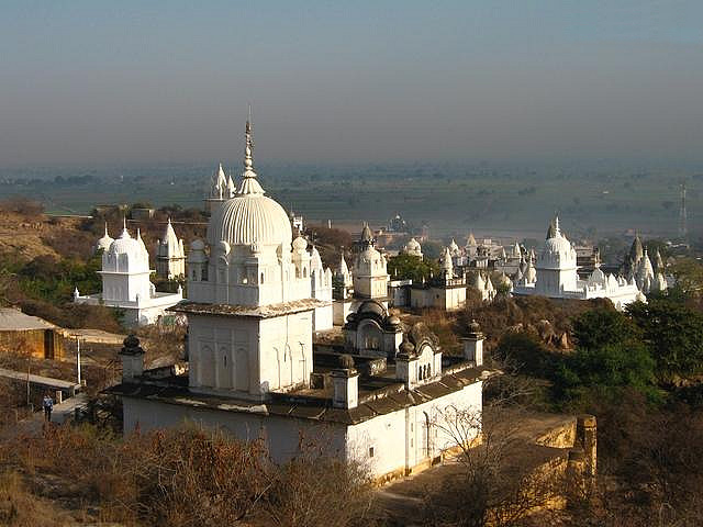 Sonagiri Jain Temples, Madhya Pradesh, India